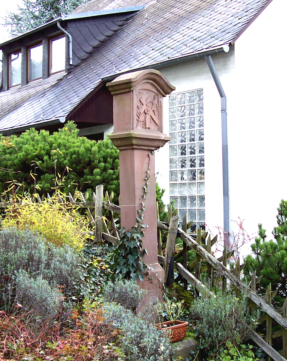 Wasserliesch, Kreuzwegstation